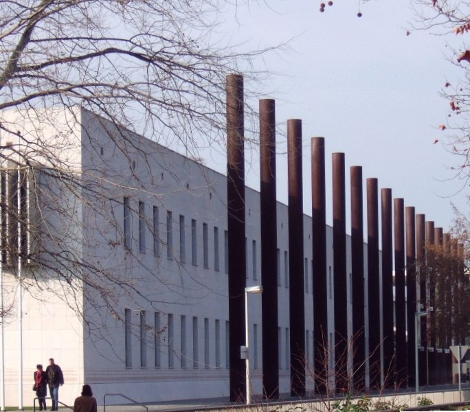 Gustav Peichl: 16 Stahlsäulen an der Bundeskunsthalle in Bonn Material: Cor-Ten-Stahl